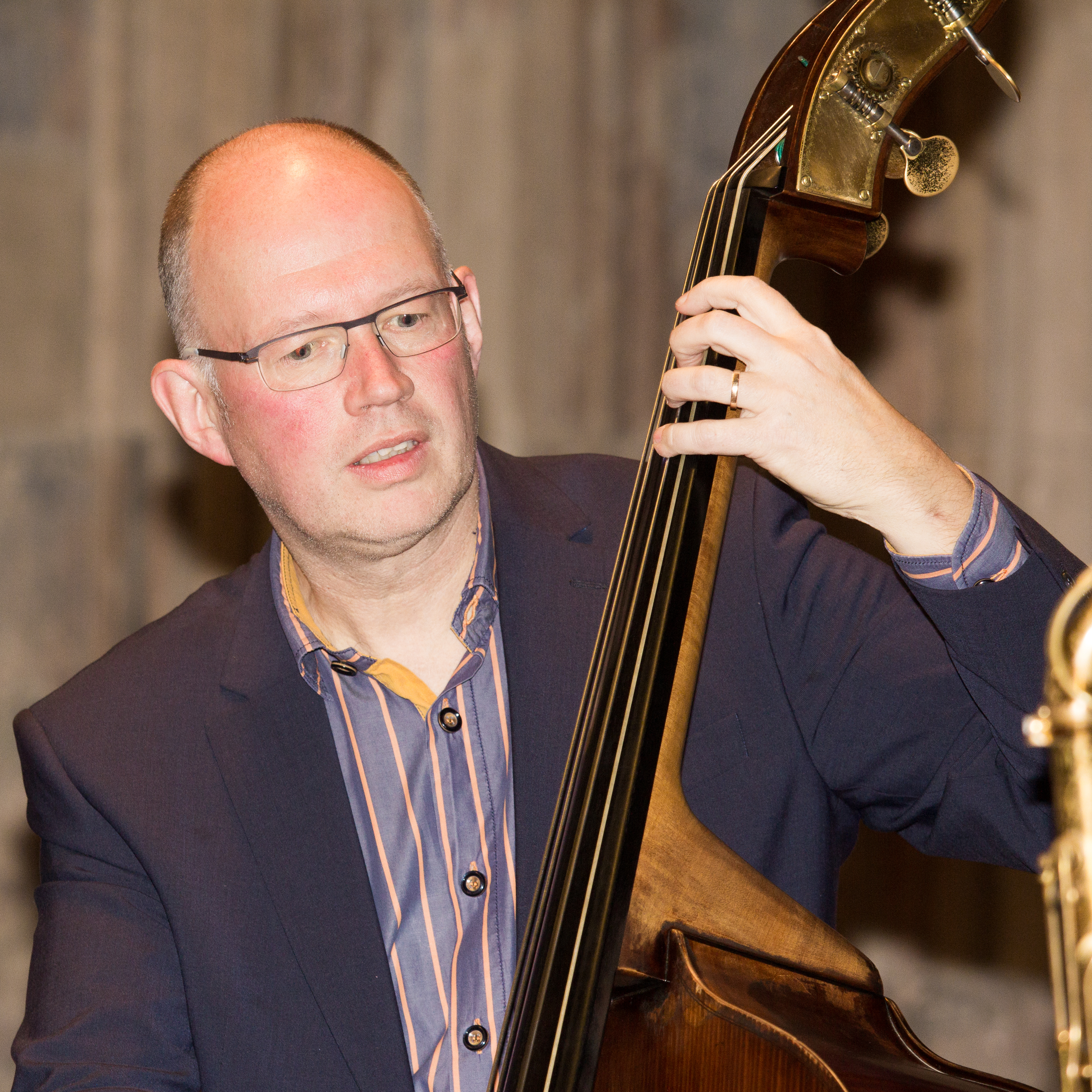 Empfang für Fritz Schramma im Kölner Rathaus zum 70. Geburtstag zu einem Jazz-Aperitif Musiker: Henning Gailing (Kontrabassist)